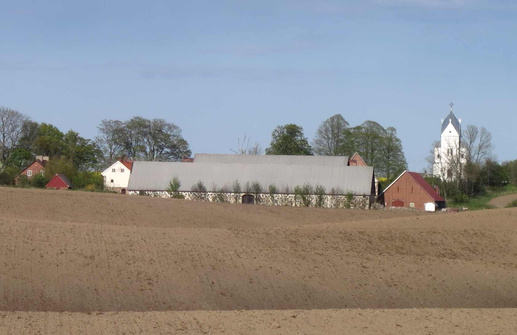 Baldringe gård